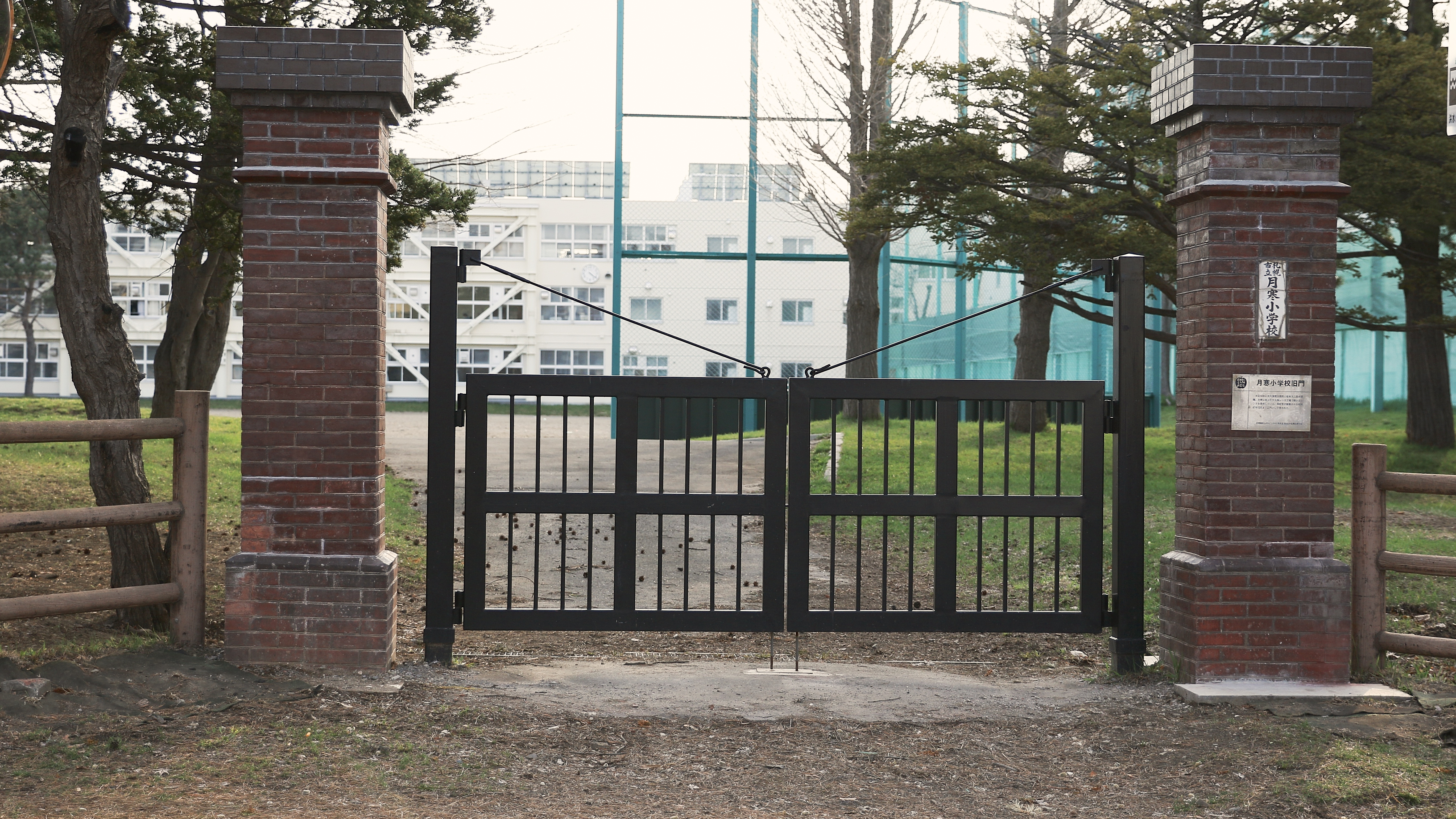 新型コロナウィルスの影響で閉鎖中の小学校。札幌市立月寒小学校旧門。